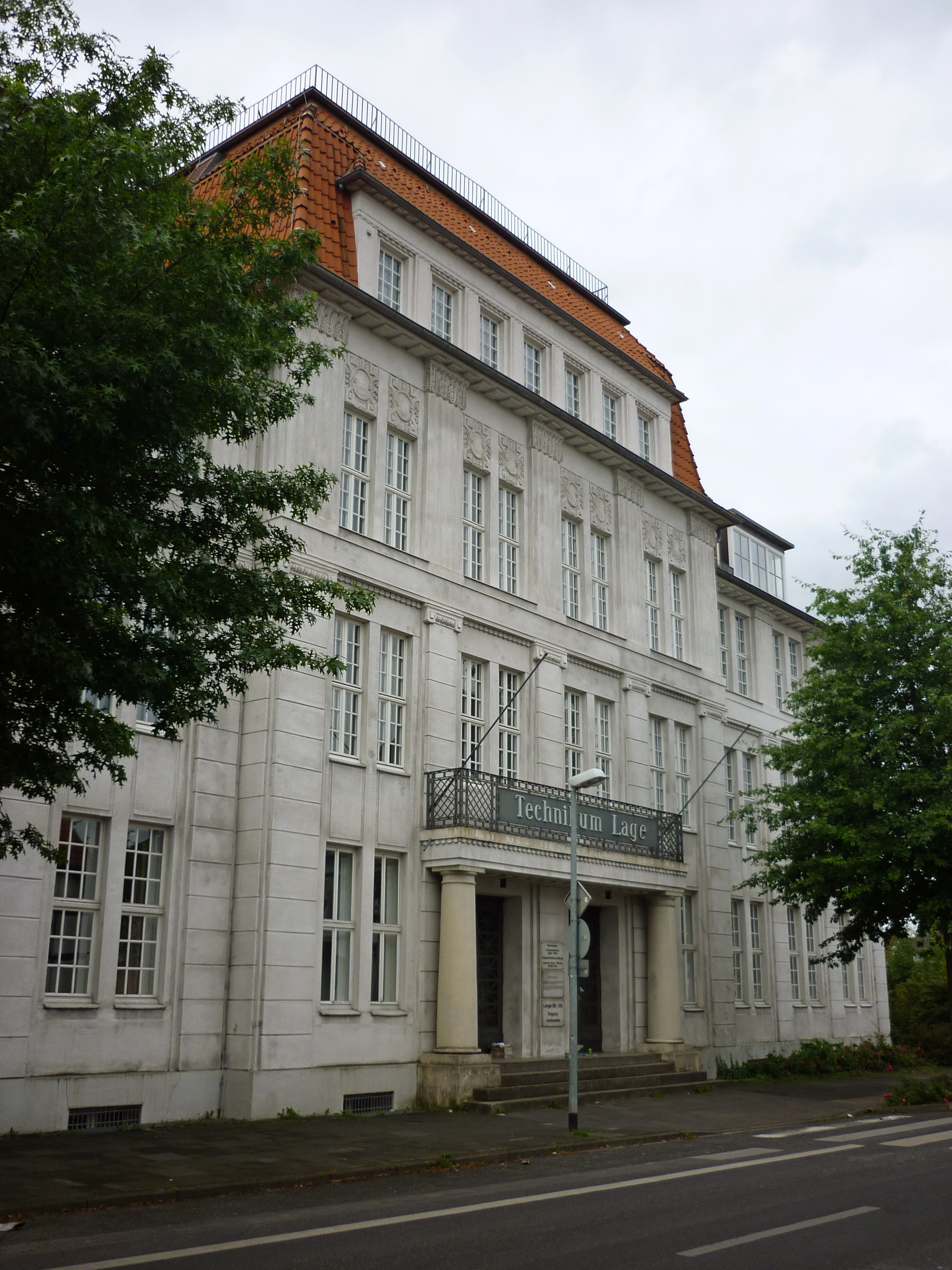 Lage (Lippe). Volkshochschule und städtische Musikschule, ehemals Technikum. Neoklassizismus (Denkmalschutz).